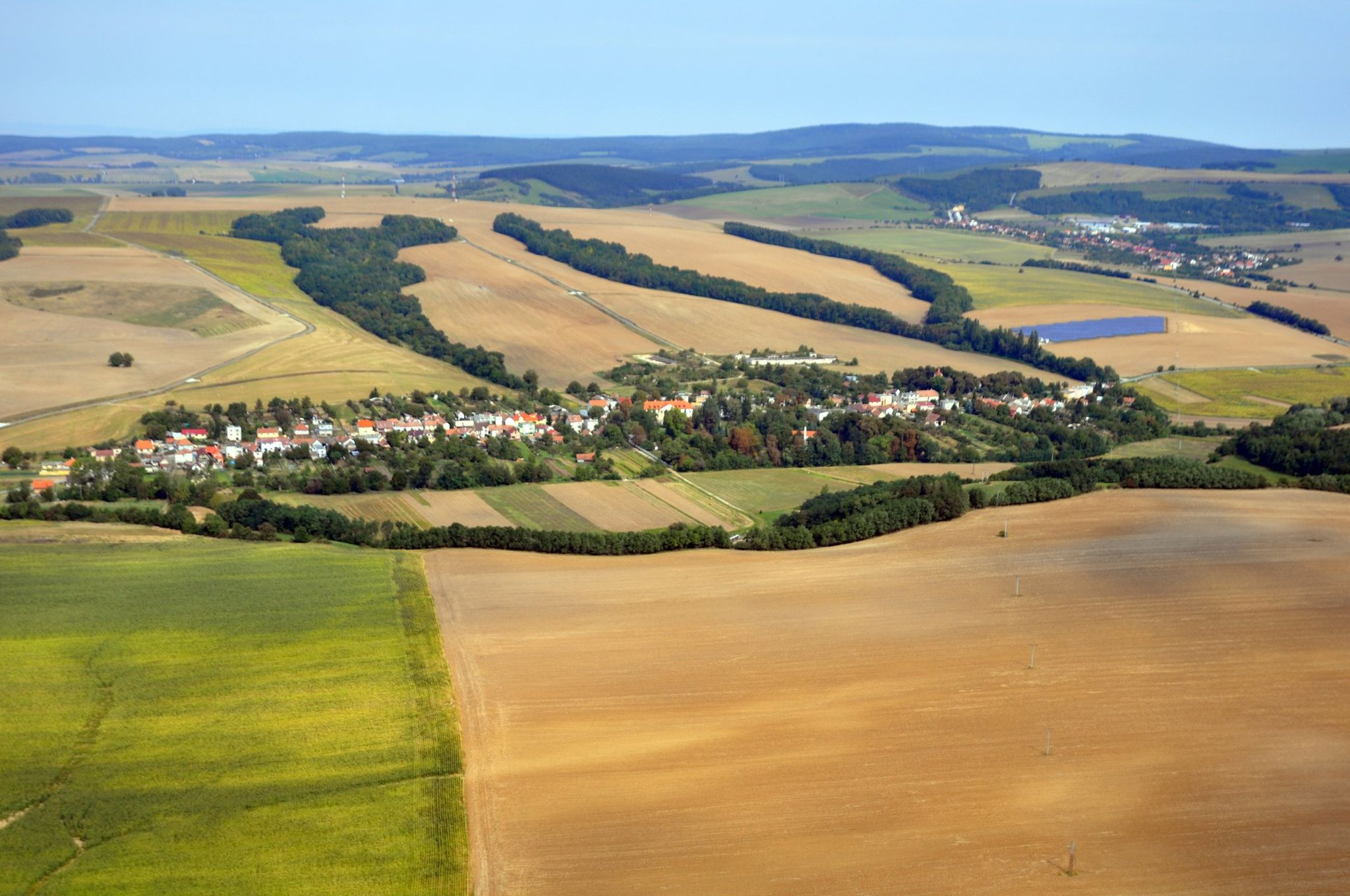 Pohľad na obec Rohov z lietadla